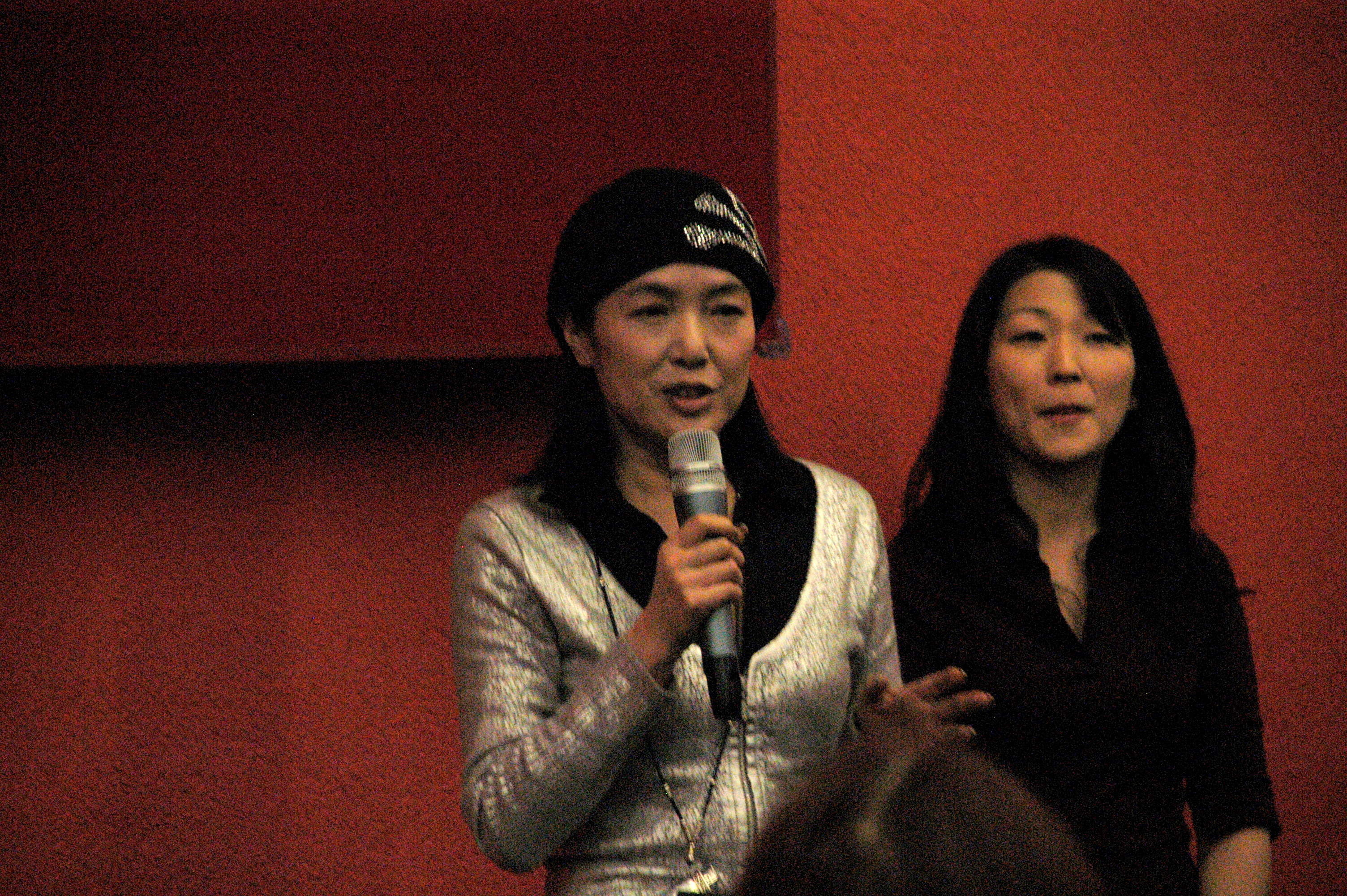 Kaori Momoi , photographiée le 19 mars 2007 par Frédéric Lemaréchal (c'est moi) dans le cadre du Festival International de Films de Fribourg.